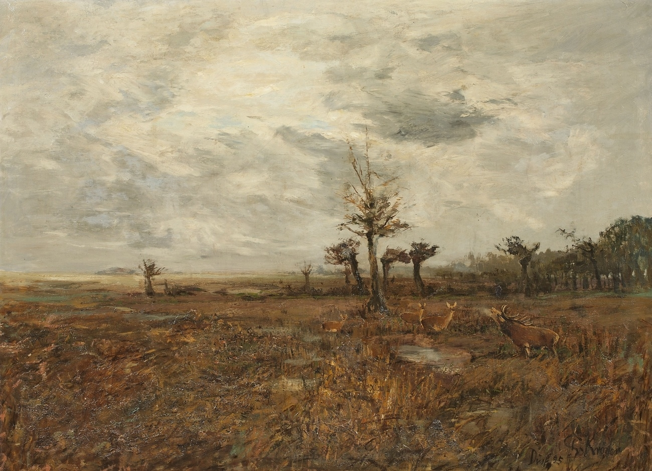 Herbstlandschaft mit Rotwild. Signiert und datiert unten rechts: Ch. Kröner Düsf. 1895 Öl auf Leinwand. 80 x 100 cm.